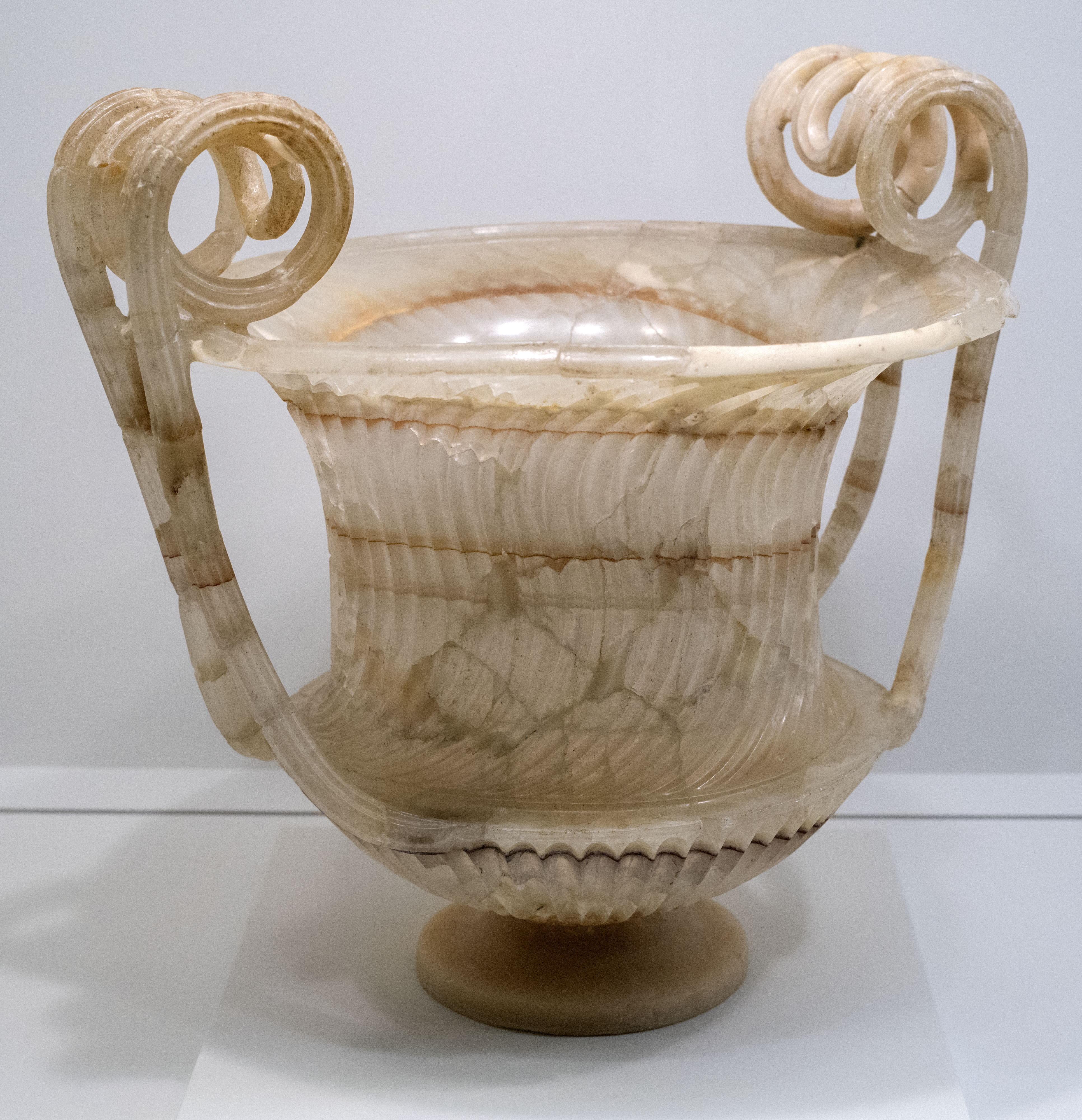 Elaborada en alabastro egipcio, esta jarra procede de la necrópolis de Ponte di San Prisco, Italia, donde fue encontrada en 1897. Está datada en la época augustea entre el año 30 a.C. y 14 d.C. Pertenece al Museo Archeologico Nazionale, Nápoles. Se expuso en Arte Canal, Madrid, en "Cleopatra y la fascinación de Egipto". Descargable en alta resolución.